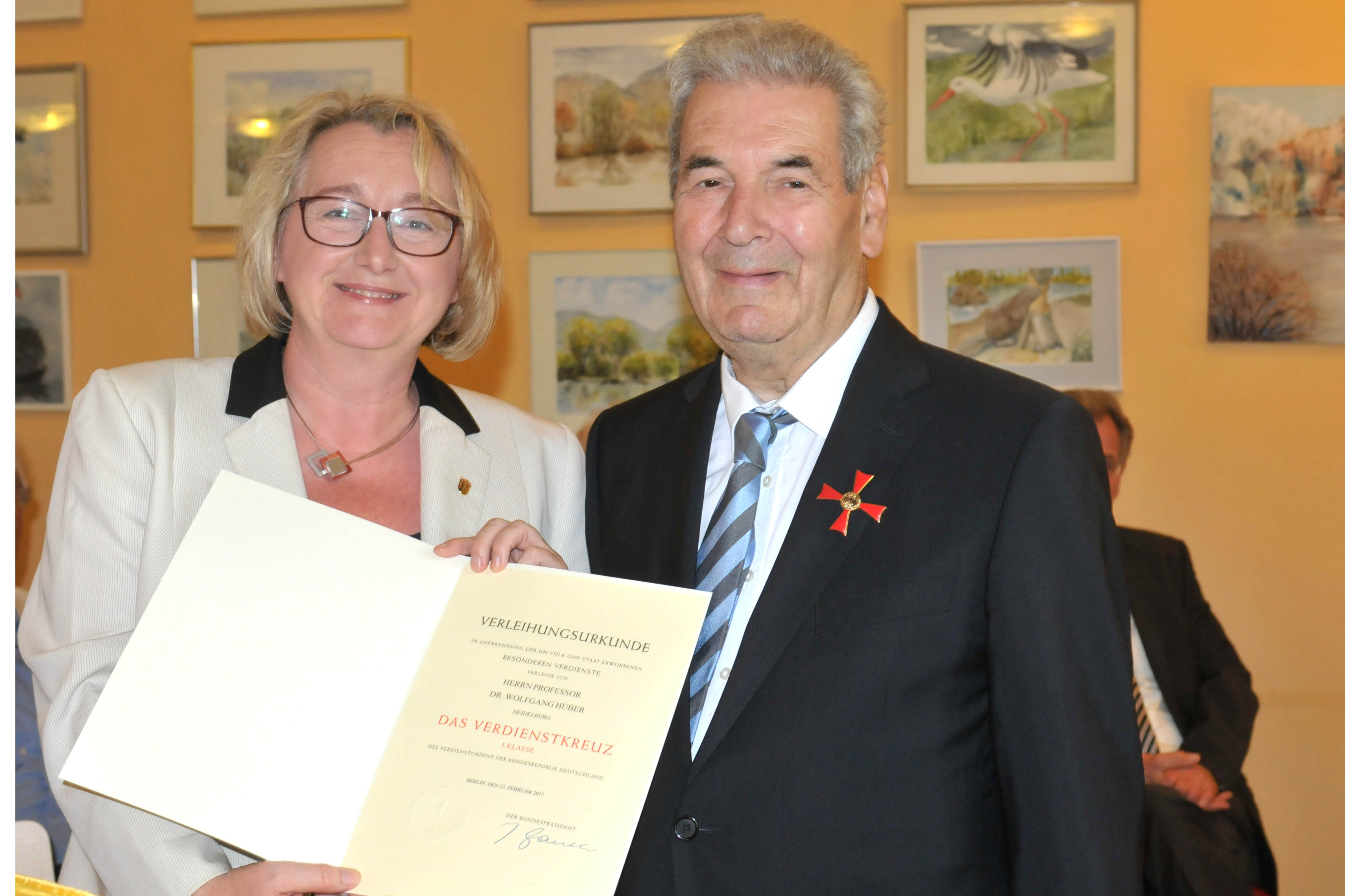 Wissenschaftministerin Theresia Bauer überreicht Wolfgang Huber das Bundestverdienstkreuz Erster Klasse